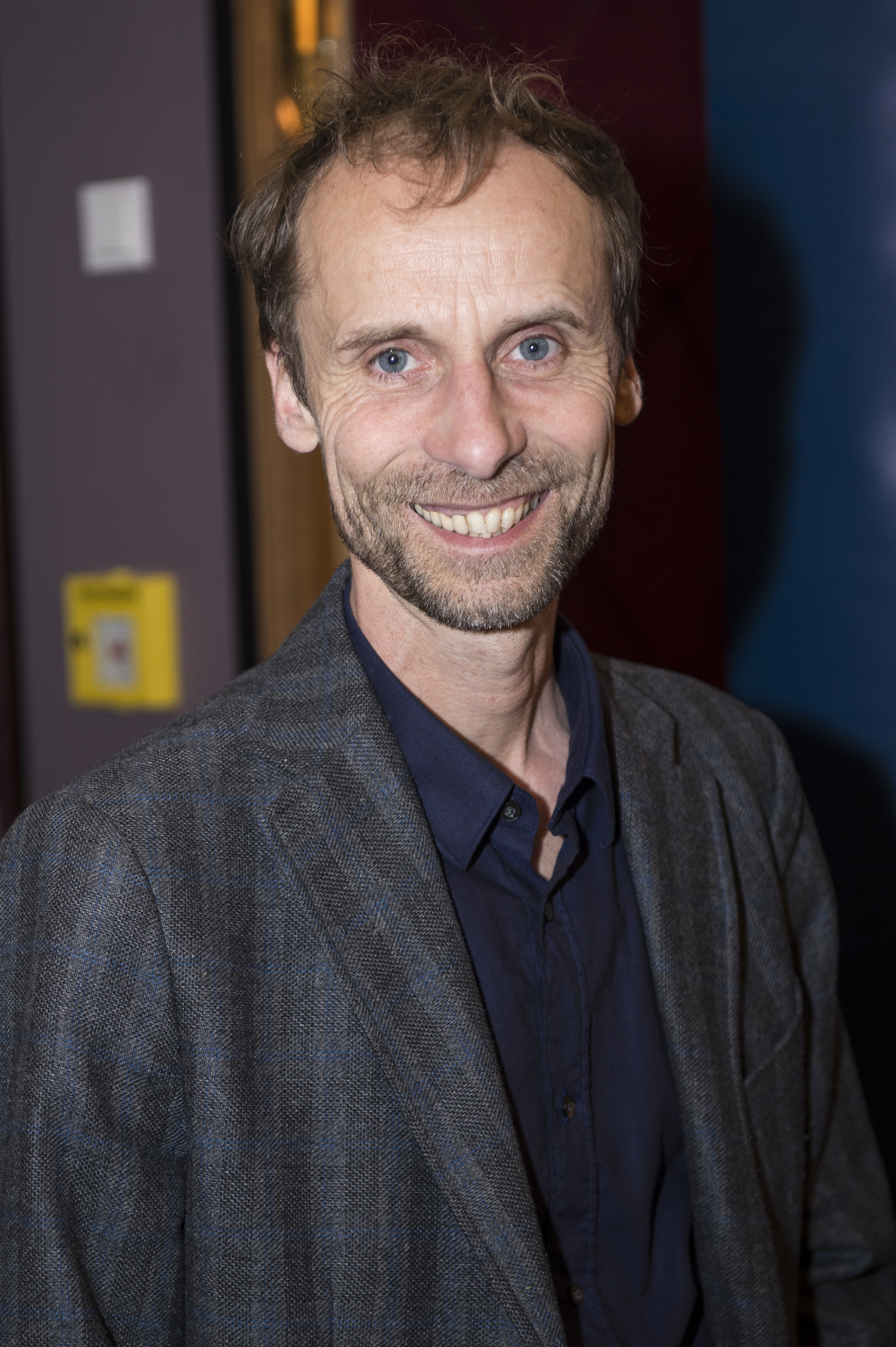 Bretonische Verhältnisse Premiere am 16.04.2014 in München Jan Georg Schütte